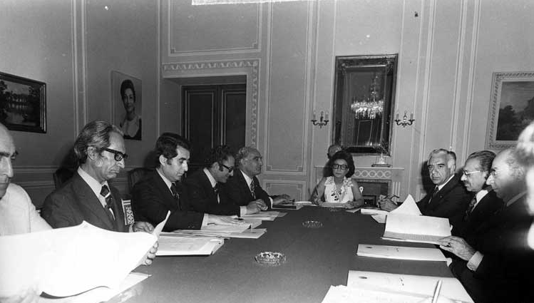 جلسه‌اي با حضور اشرف پهلوي، علي‌اشرف احمدي، محمدصفي اصفيا، منوچهر اقبال، عبدالرضا انصاري، مجيد رهنما، عبدالحسين سميعي و عبدالمجيد مجيدي